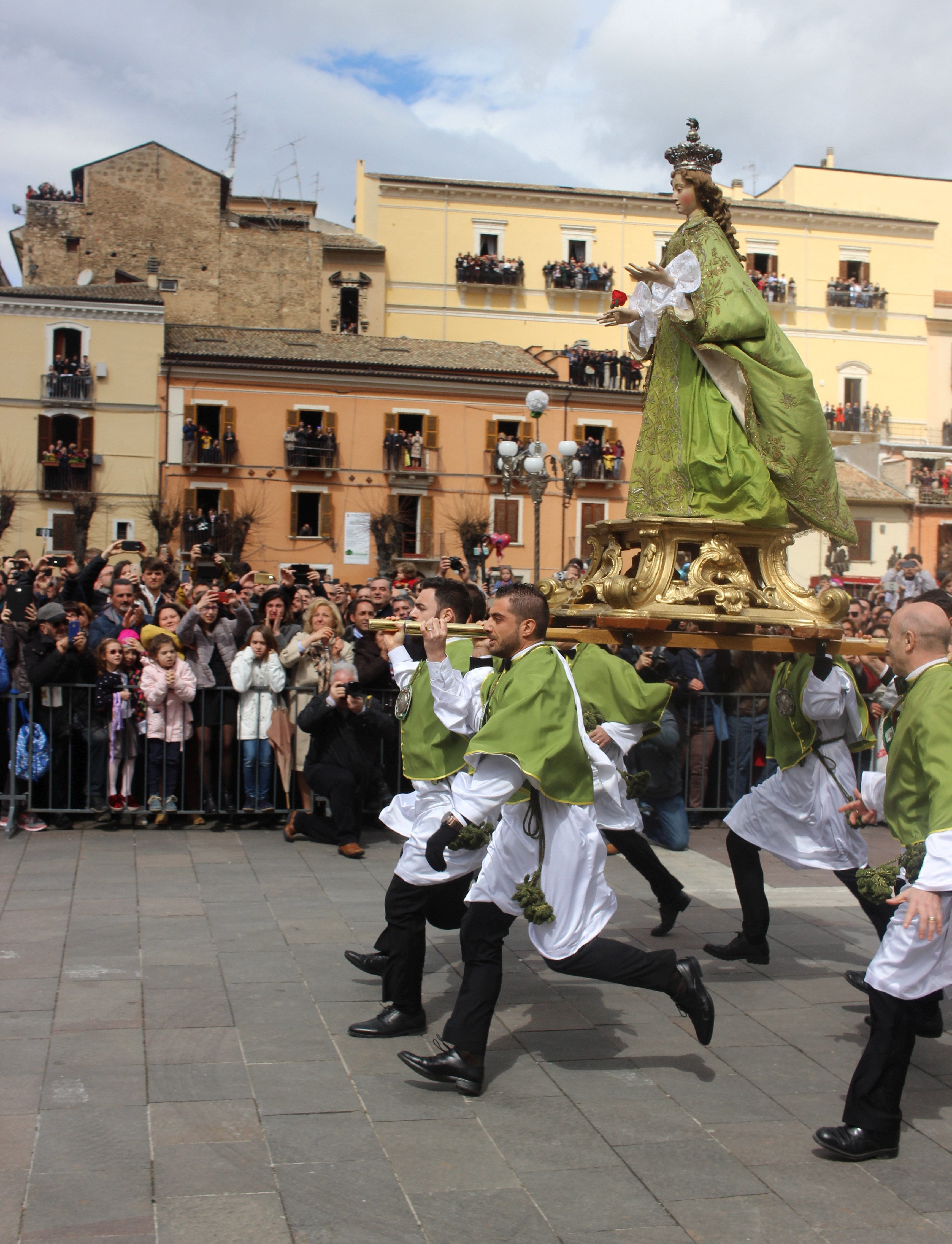 La madonna che scappa in piazza 2018